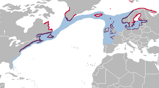 Range_map for Larus marinus based on: Lars Larsson, Birds of the World, 2001, CD-rom Mullarney, K. Svensson, L. Zetterström, D. (1999) Fågelguiden, Europas och medelhavsområdets fåglar i fält. Stockholm: Albert Bonniers förlag David Allen Sibley, The Sibley Guide to Birds, 2000, ISBN 0-679-45122-6 Description Red - Breeding ground Purple - All year round Blue - Winter